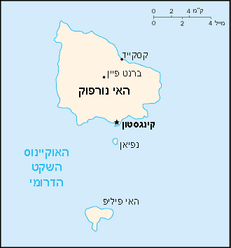 מפת האי נורפוק.